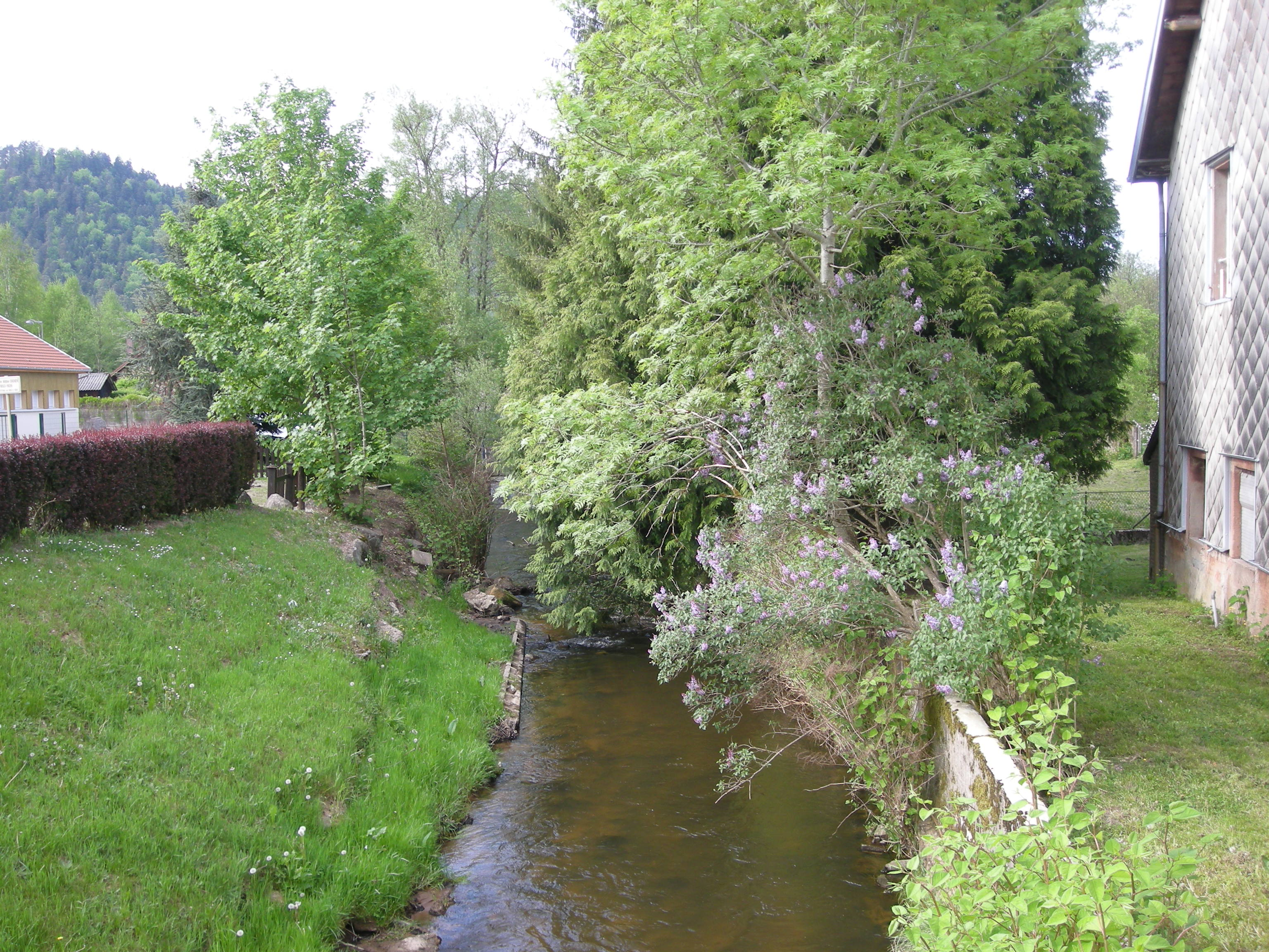 La Valdange près du centre d'Etival-Clairefontaine (Vosges)